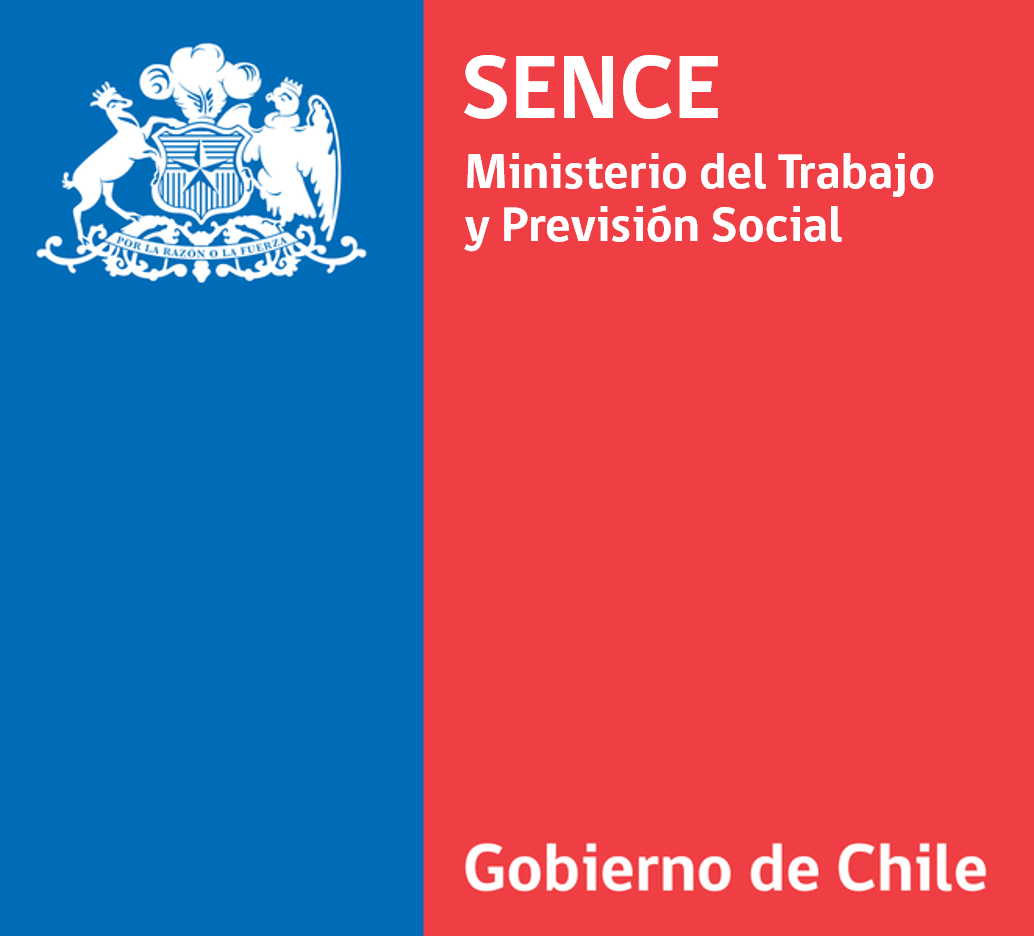 Logo del Servicio Nacional de Capacitación y Empleo del Ministerio del Trabajo y Previsión Social.